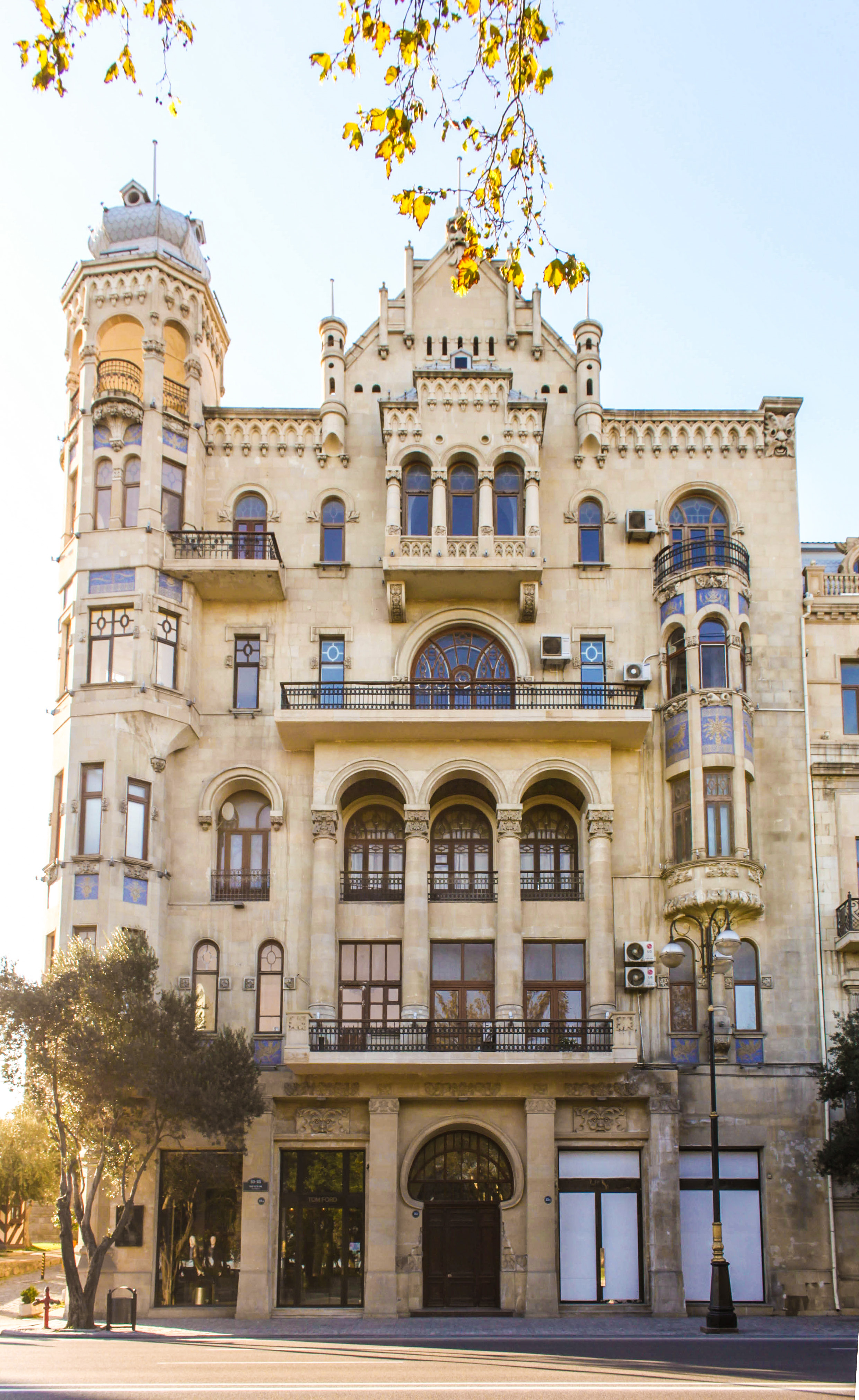 Yaşayış evi, Neftçilər prospekti, 103 2016